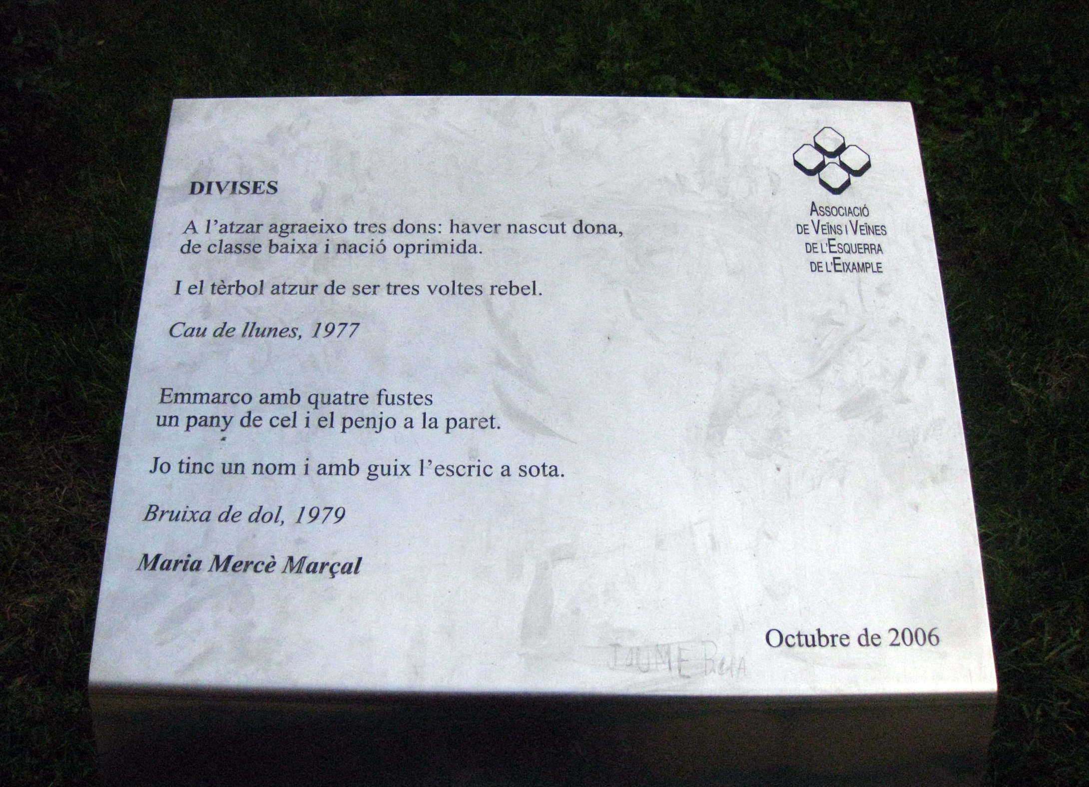 Maria Mercè Marçal. C. Provença, 91-97 -jardins interiors- (Barcelona)